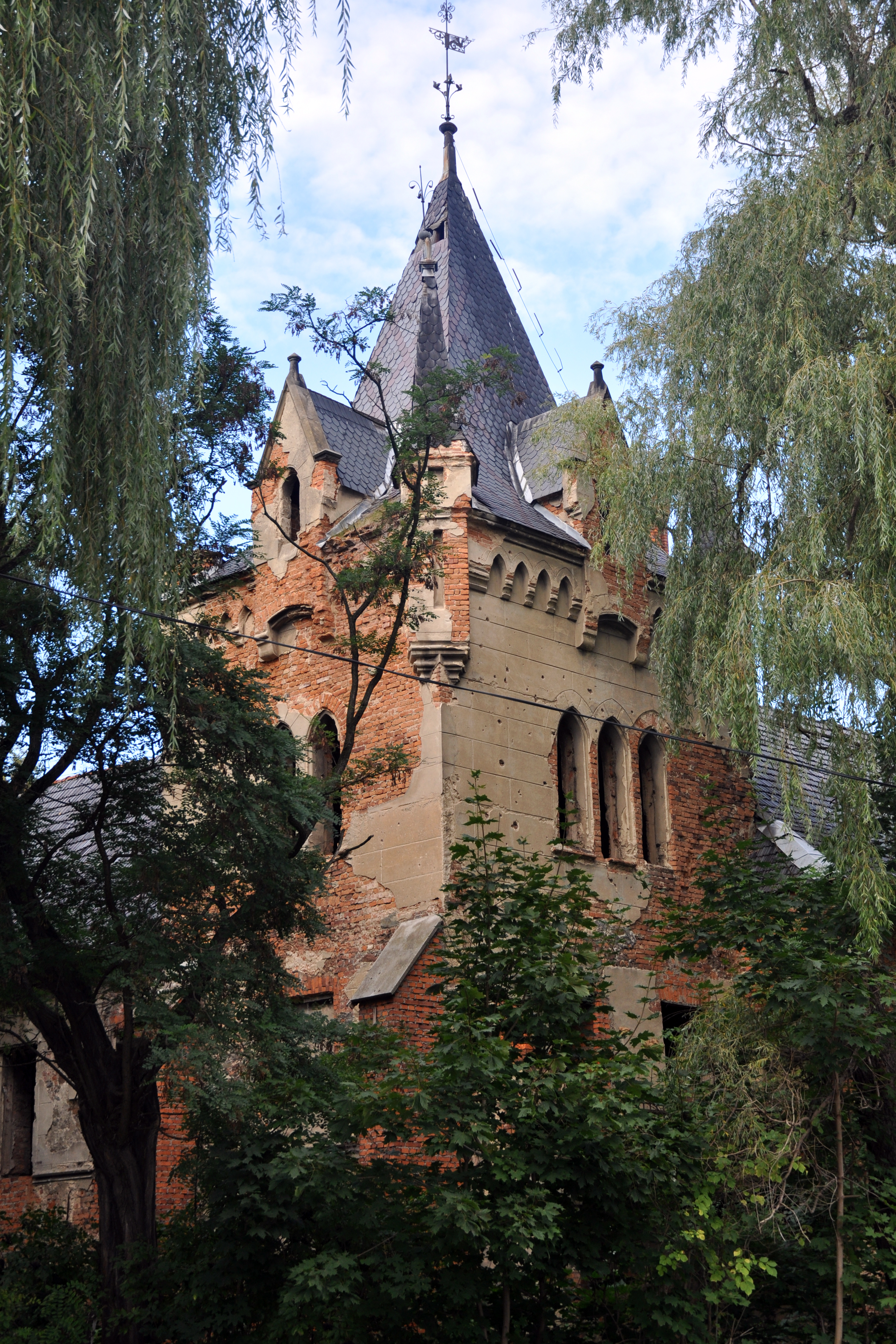 Łąka Prudnicka, zamek (nr 16), XVI, 2 poł. XIX